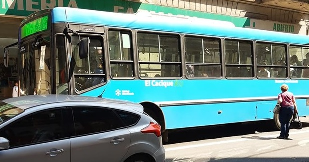 Mercedes-Benz O-500 de la línea 126, de la empresa El Cacique Ros